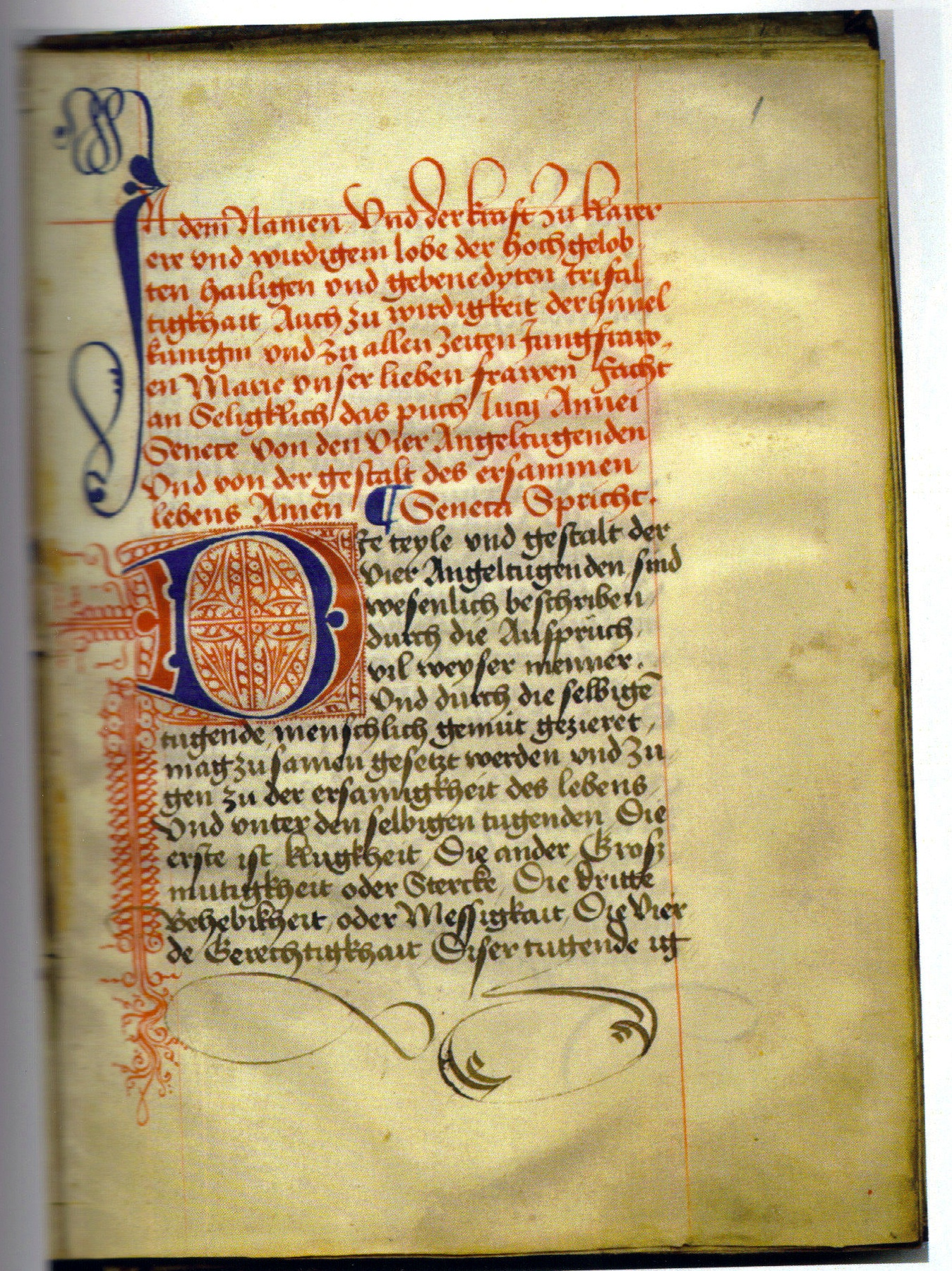 Martin von Braga: Von den vier Angeltugenden, Übersetzung in Nürnberg, Germanisches Nationalmuseum, Merkel Hs 4° 540, Bl. 1r)